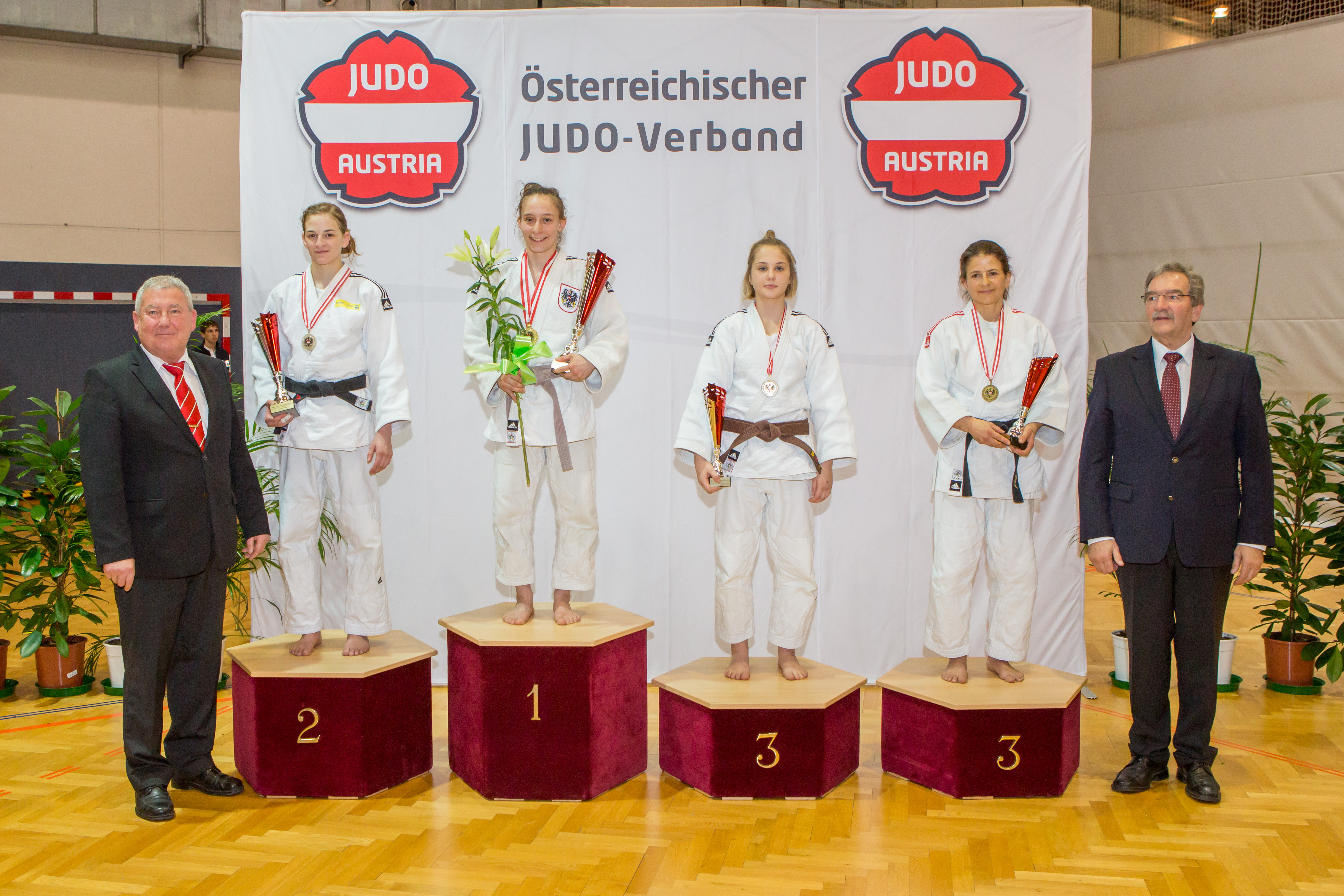 Judo Staatsmeisterschaften 2016 Siegerehrungen -48 kg 1. Platz: TANZER Katharina 2. Platz: KRAFT Mara Tabea 3. Platz: DALL Andrea 3. Platz: WALDNER − WENZEL Elisabeth